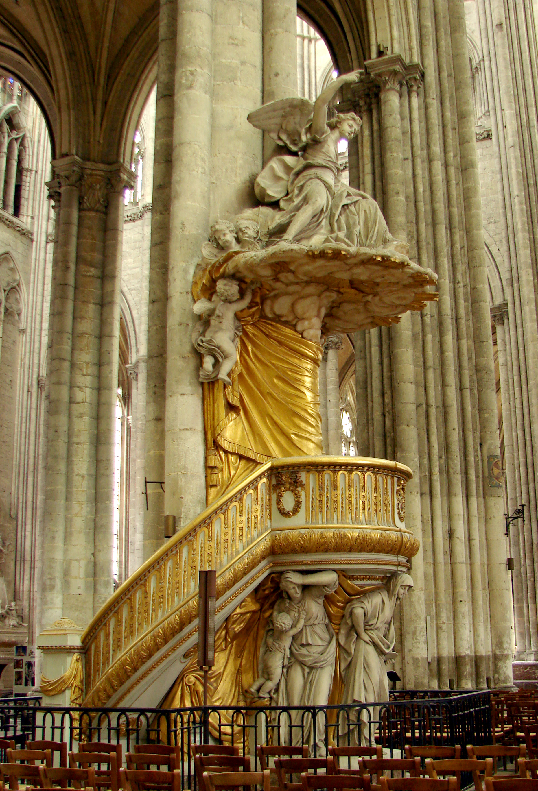 Chaire de la cathédrale d'Amiens.